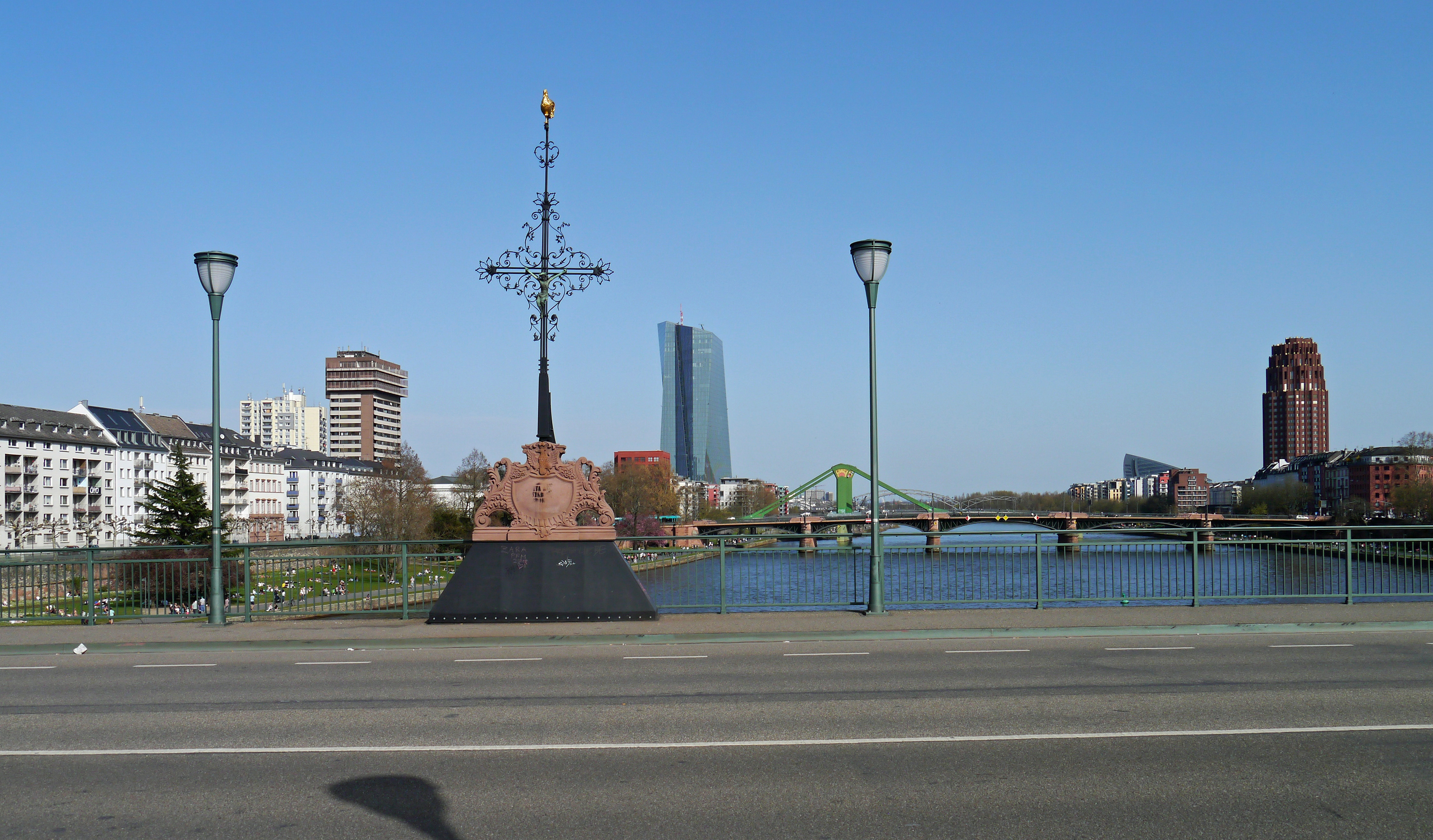 Der restaurierte Brickegickel (2018) auf der Alten Brücke in Frankfurt am Main.